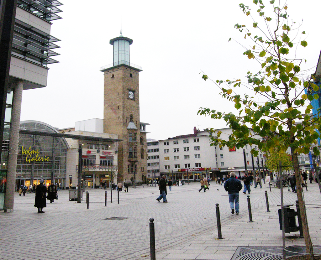 Hagen, Friedrich-Ebert-Platz mit historischem Rathausturm